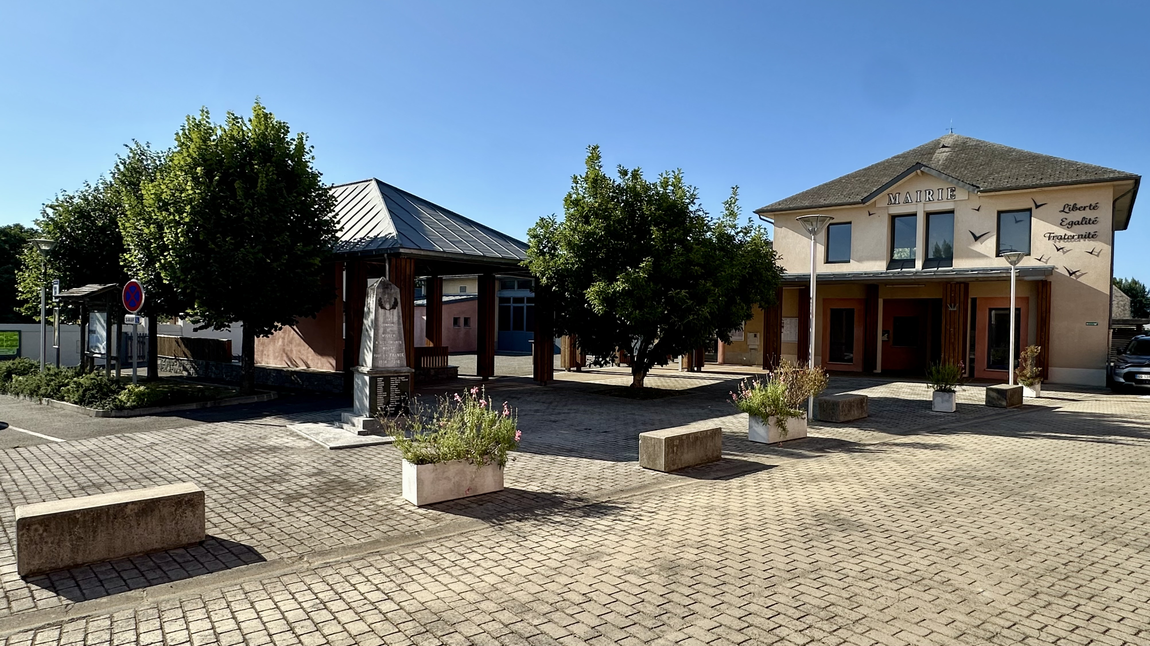 Mairie et place de Visker (Hautes-Pyrénées, France)